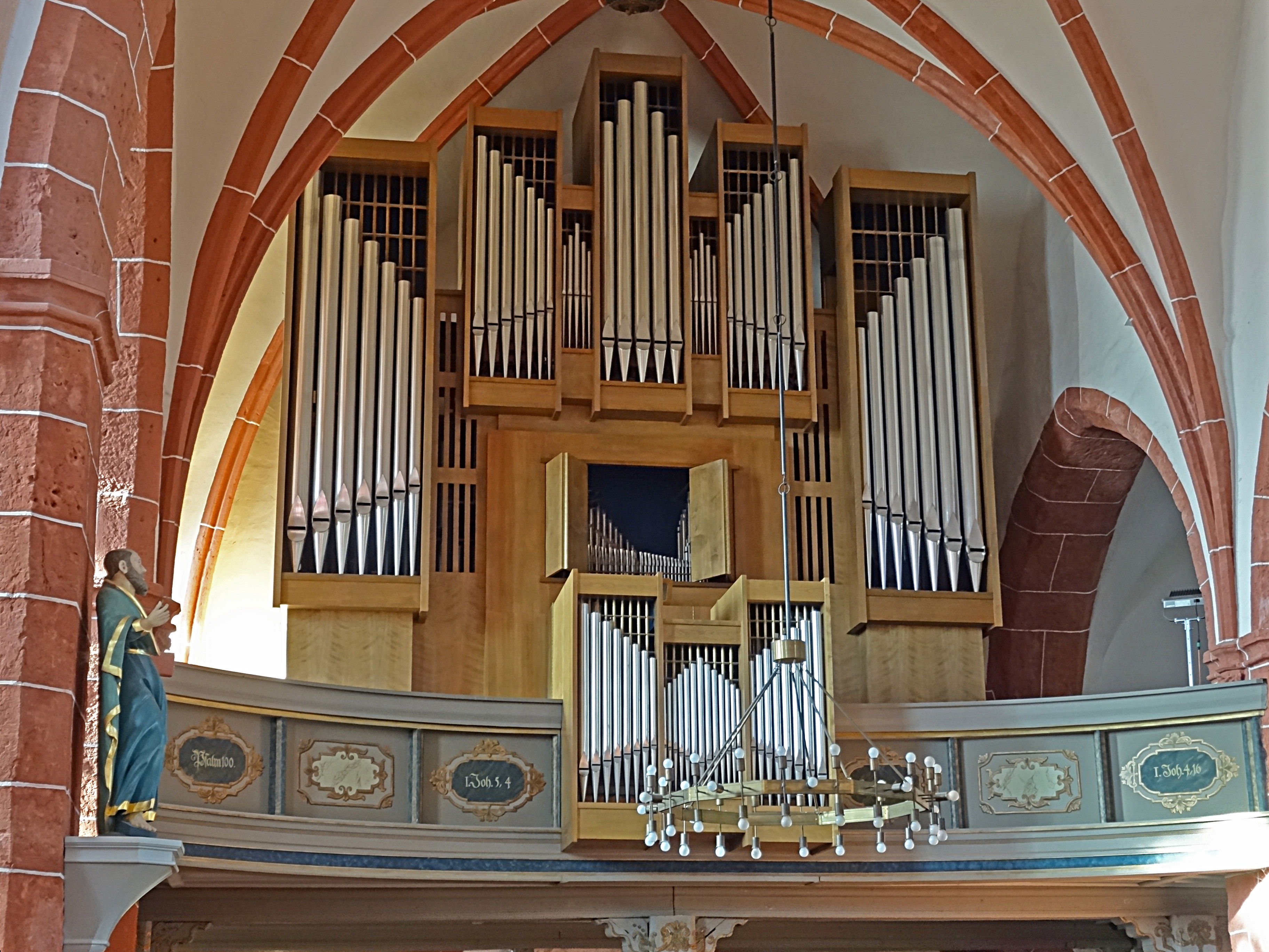 Schuster-Orgel (1995, IIIP/37, 2436 Pfeifen) in der Stadtpfarrkirche St. Blasii (Nordhausen)